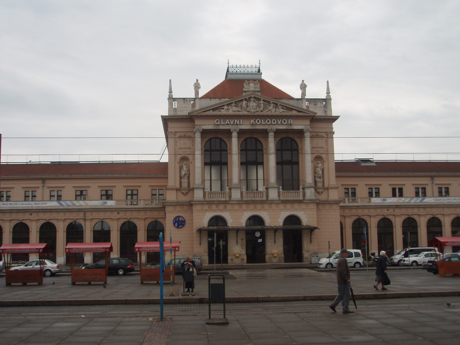 Glavni kolodvor